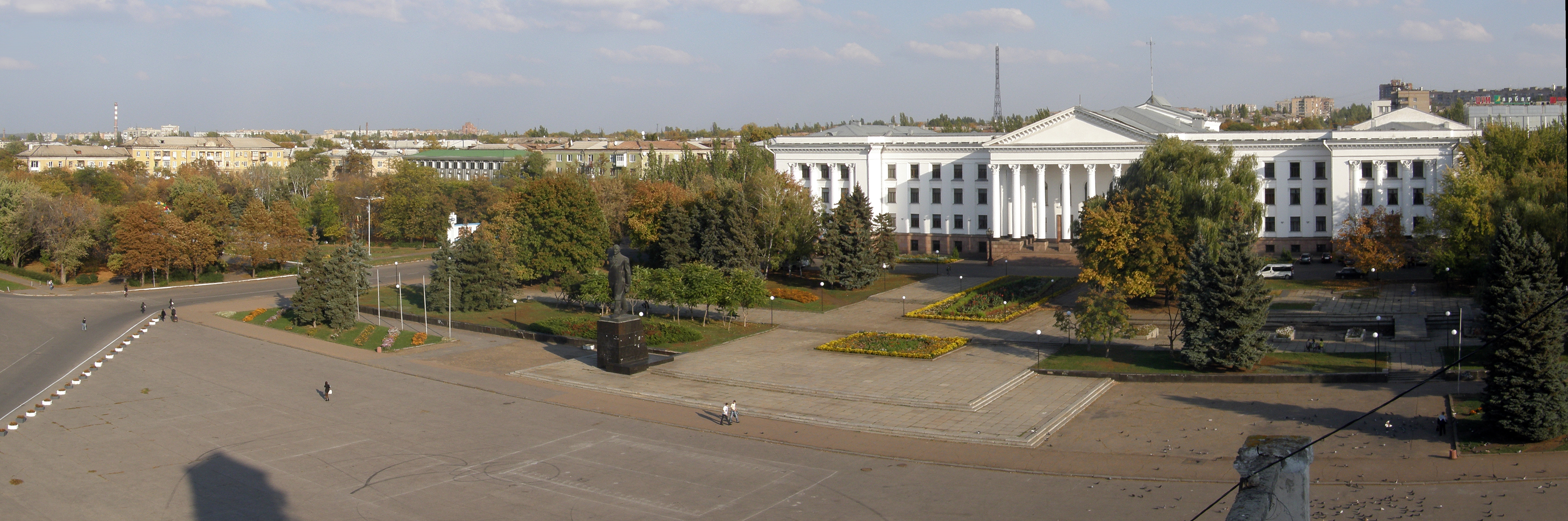 Краматорск